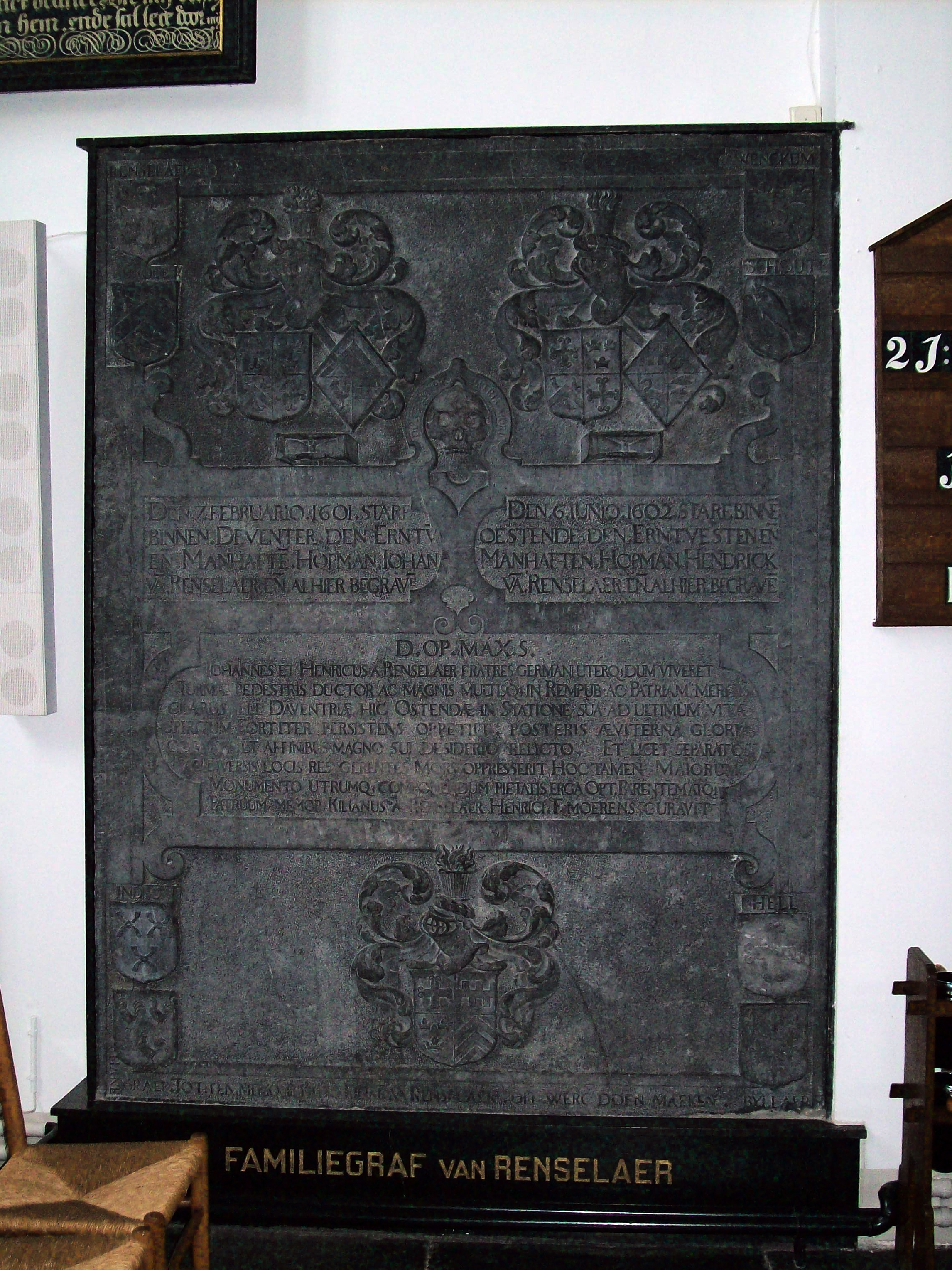 Grafzerk van de fam. van Renselaer in de Grote Kerk te Nijkerk Inscription upper edge left, "Renselaer" above the family shield and under that "...ole" above the family shield Inscription upper edge right, "Wenckum" above the family shield and under that "Schoute" above the family shield Inscription middle center around a skull: "dulce est pro patria mori" Inscription left center: Den 7 Februario 1601 starf binnen Deventer den erntv en Manhafte Hopman Johan Va. Renselaer en alhier begraven. Inscription right center: Den 6 Junio 1602 starf binne Oestende den erntvesten en Manhaften Hopman Hendrick Va. Renselaer en alhier begrave. Inscription lower center (Latin): D. OP. Max. S. Johannes et Henricus A Renselaer fratres germaniuter Que viveret Turma pedestris ductor ac magnis muliisq in Rempub-ac Patriam meritis clarus le Daventriae hic Ostendae in statione sua ad ultimum vita spiritum Fortiter persistens oppetict posteris aviterna gloria cognatis et affinibus magno sui desiderio relicto. Et licet separato ac diversis locis res gerentes Mors oppresserit. Hoc tamen majorum monumento utrumq. componendum pietatis erga opt-Parentum atq. Patruum memor. Kilianus A Renselaer Henrici F. Moerens curavit. Inscription lower left, "Indick" above the family shield and under that "Hanegraef" below the family shield Inscription lower right, "Hell" above the family shield and under that "Byllaer" below the family shield Inscription bottom edge between the family shields of Hanegraef and Byllaer: Hanegraef |Tot ten Memorie heeft Kiliaen Van Renselaer dit Werc doen maken | Byllaer